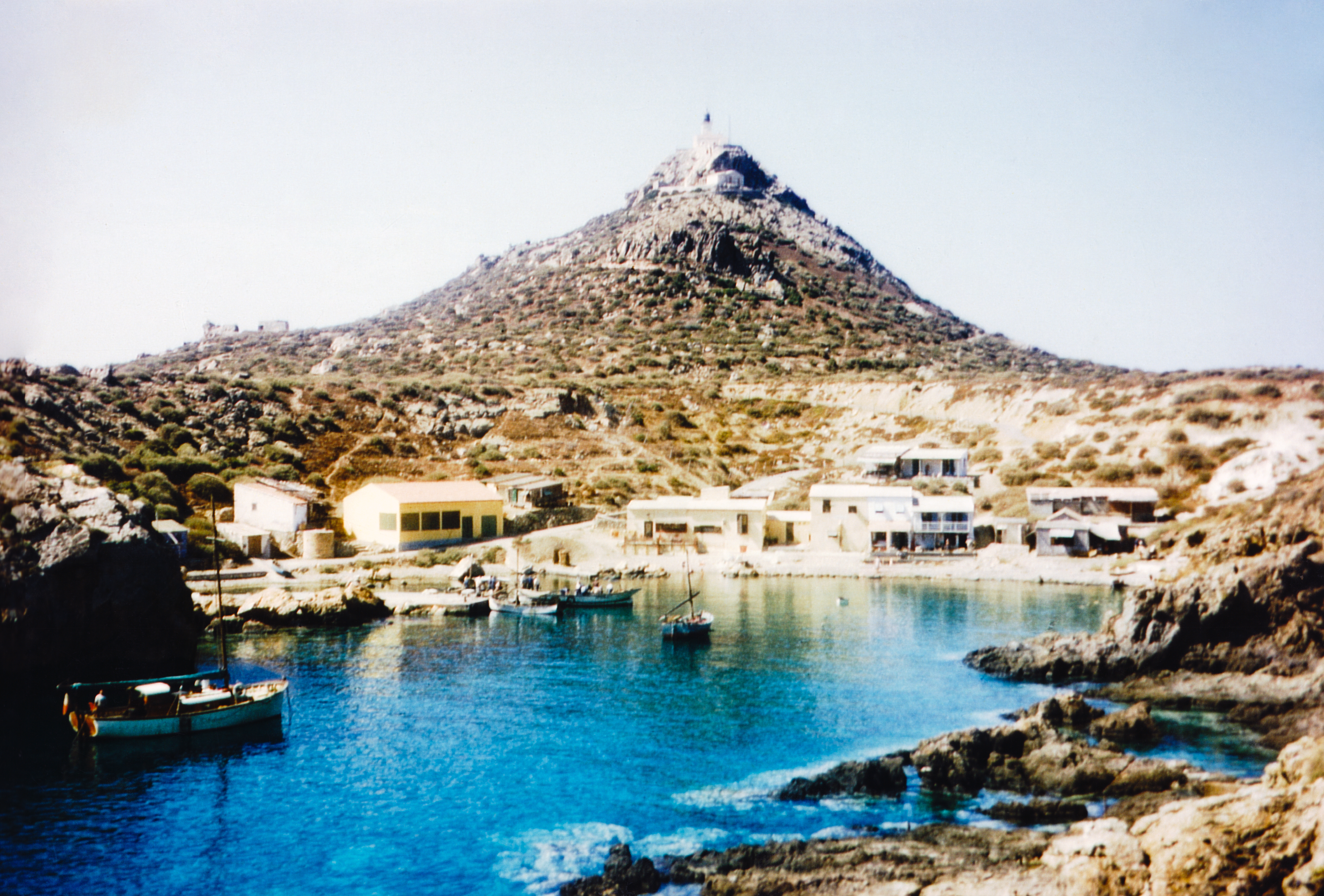 Touria - Îles Habibas, photo Cardona